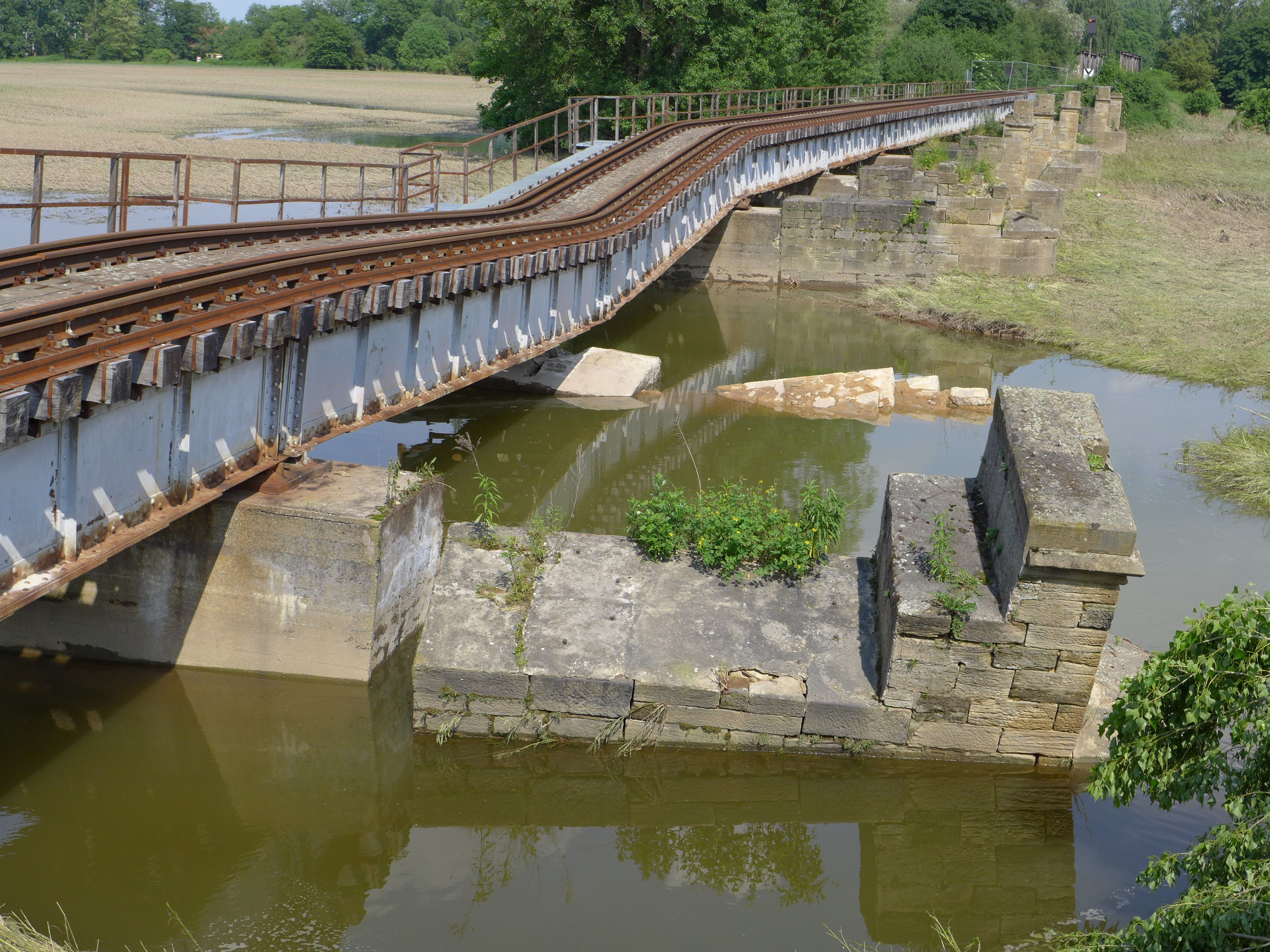 Hochwasser an der Weißen Elster, Zeitz. Bahnstrecke Zeitz - Altenburg: zerstörte Flutbrücke vor der eigentlichen Elsterbrücke.